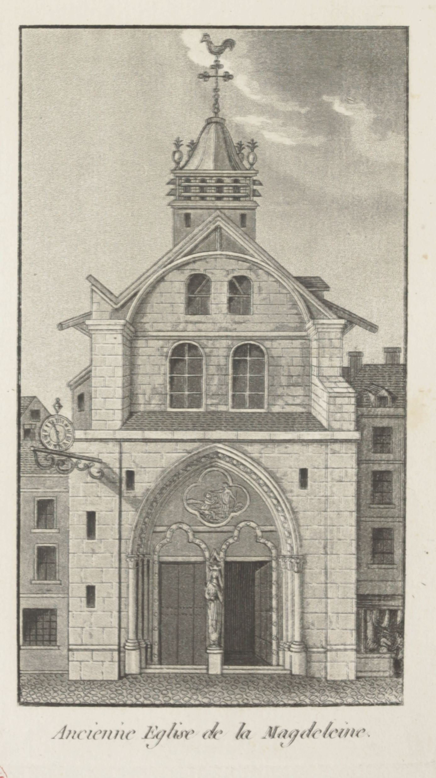 Ancienne église de la Magdeleine, à Paris.